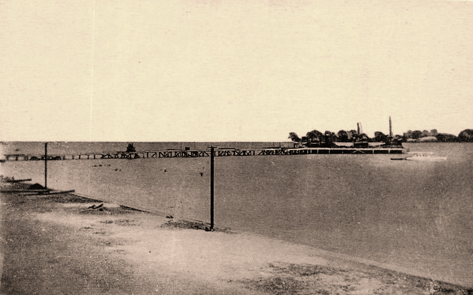 GUINEE PORTUGAISE - Vista da Ponte caes